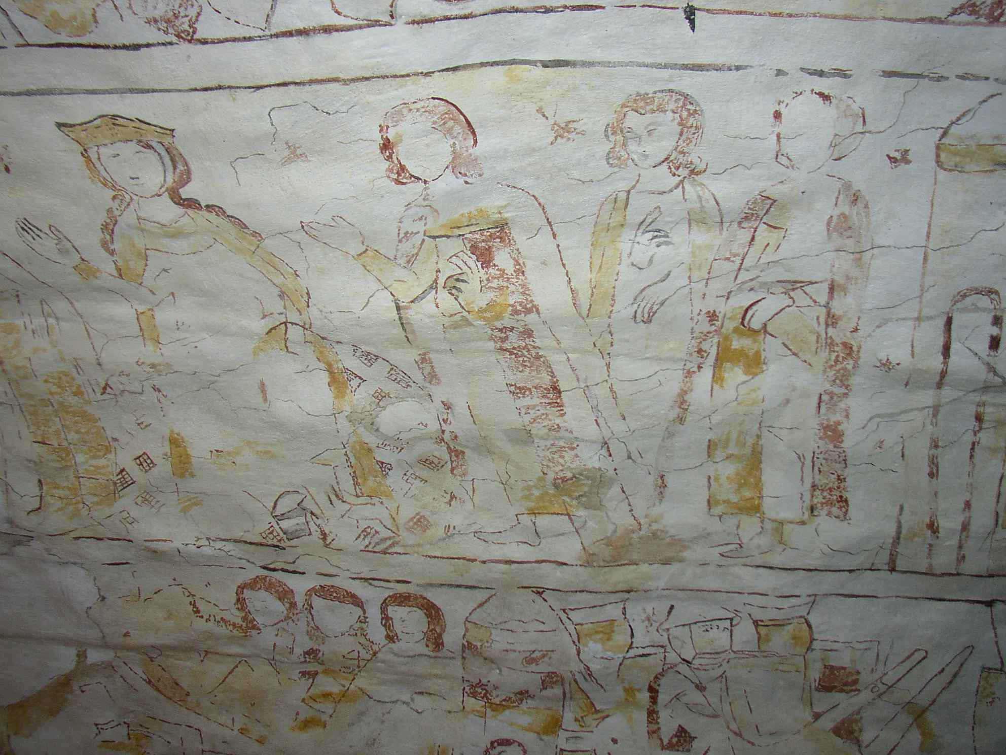 Laudine berät sich mit den Würdenträgern/Iwein-Malerei in Schmalkalden